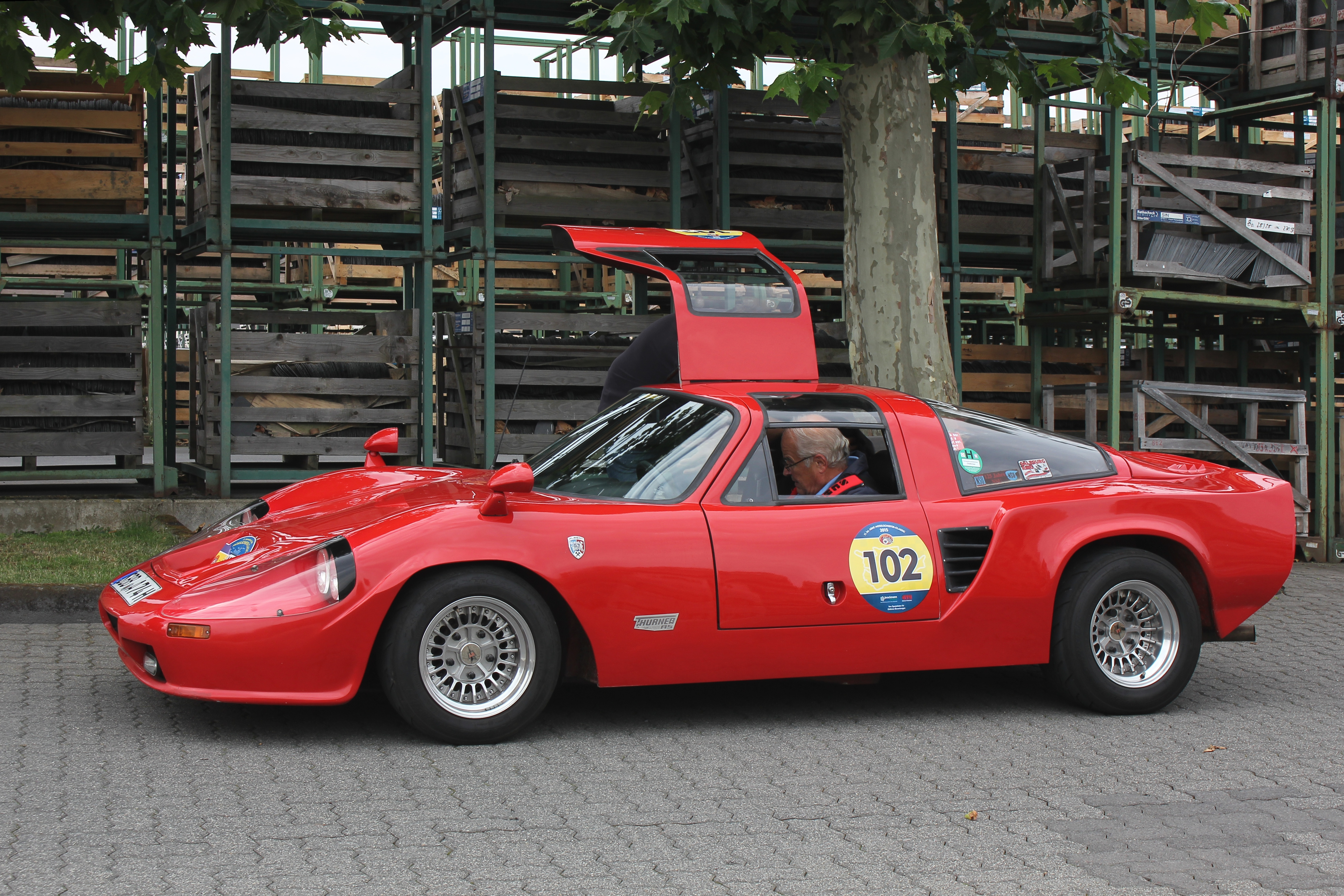 Thurner RS auf der Basis des NSU 1200 C, Motor aus dem NSU TT, Kunststoffkarosserie, 121 Stück gebaut von 1969 bis 1974